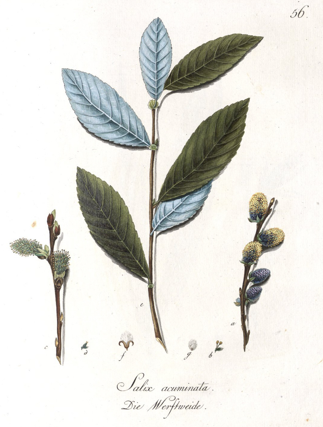 Abbildung Der Hundert Deutschen Wilden Holz-Arten Nach Dem Nummern-Verzeichnis Im Forst-Handbuch Von F. A. L. Von Burgsdorf; Tafel: Die Werftweide (Salix acuminata) Garnweide Erklärung